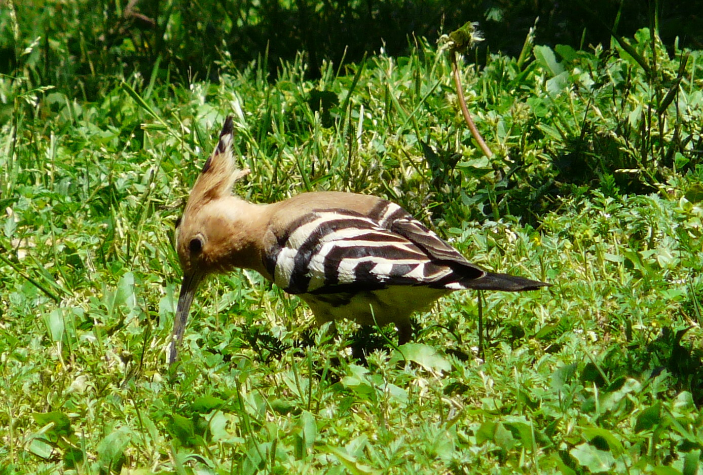 Puput (Upupa epops) a Sant Feliu de Llobregat, dins del nucli urbà.